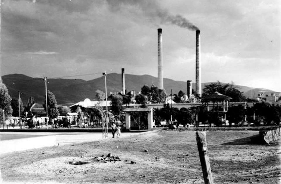 Vieja panoramica, Atencingo 1950